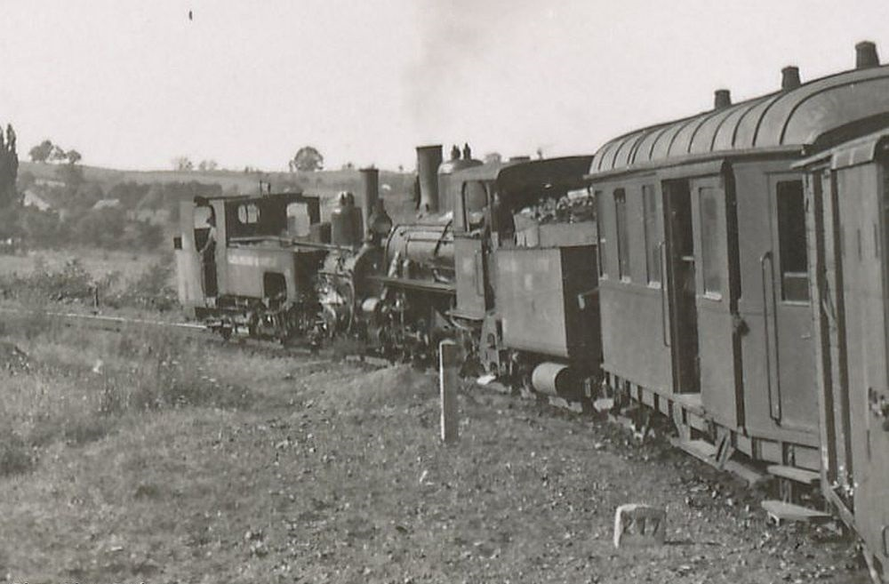 Bahnfahrt nach Sarajevo bei km 217 im Jahr 1940. An der Spitze befindet sich eine Lokomotive Baureihe 189, hinter folgt eine Maschine der Serie 73.